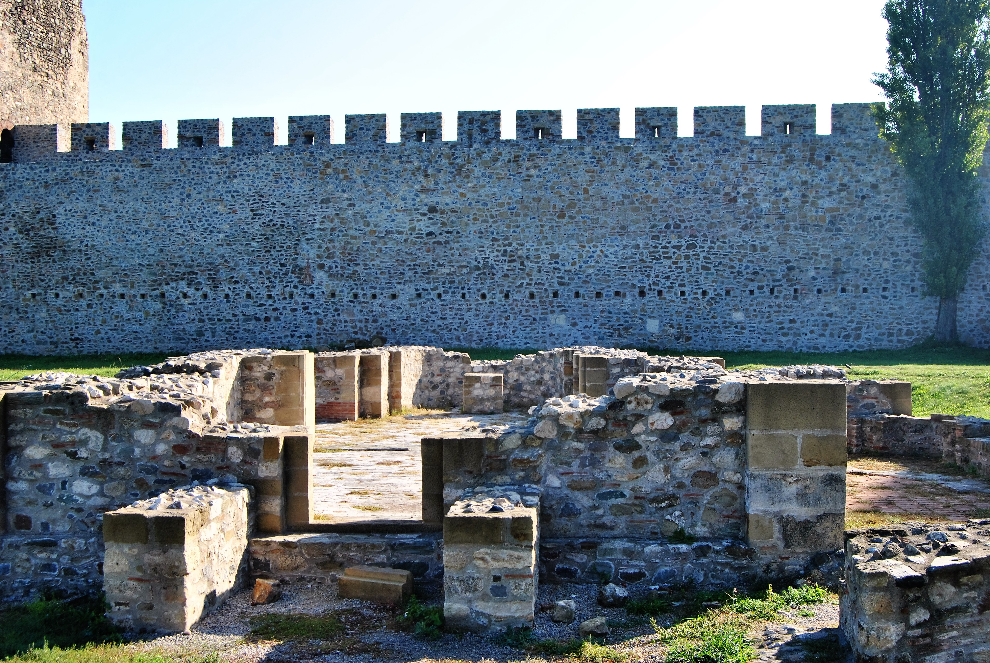 Ostaci crkve u smederevskoj tvrđavi